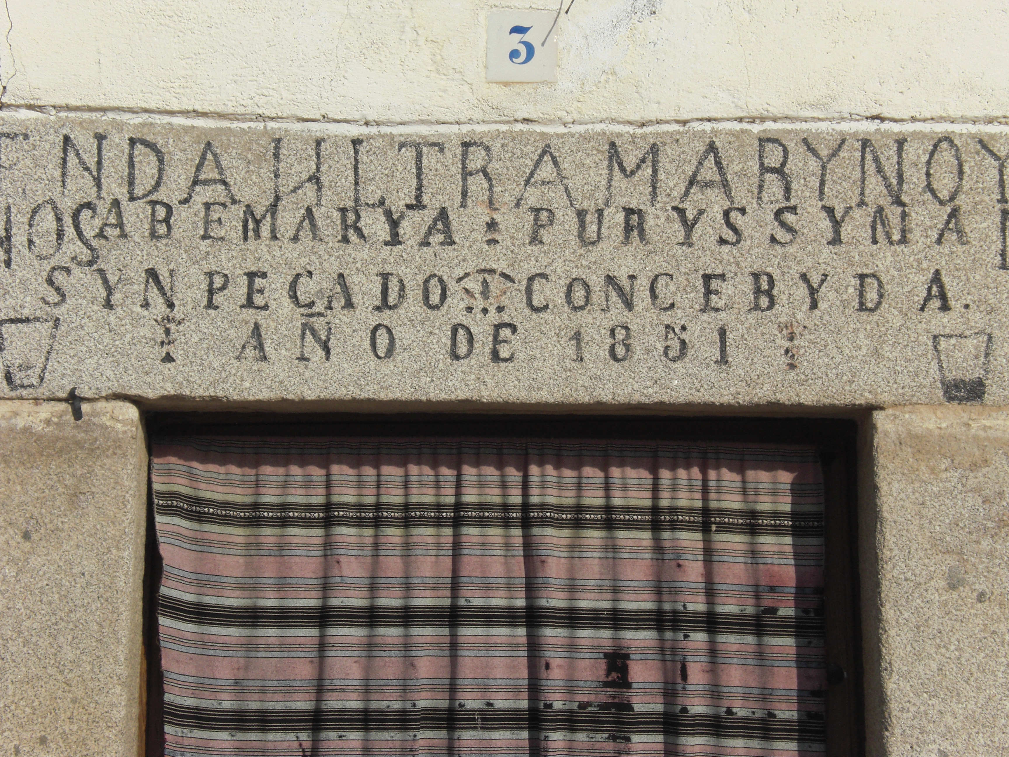 Dintel con incripciones grabadas del S.XIX. (Marugán)